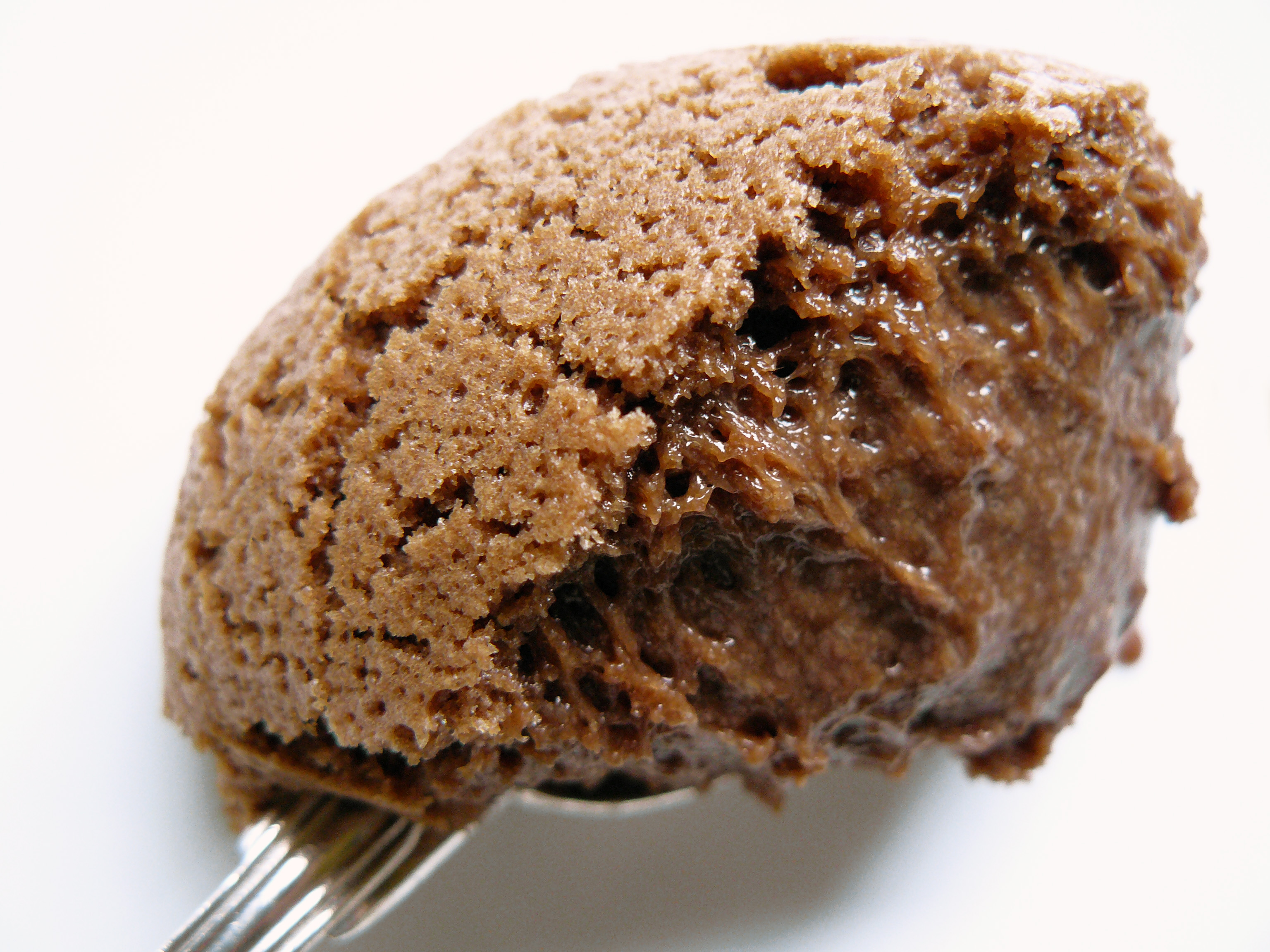 Mousse au chocolat au lait et caramel au beurre salé.